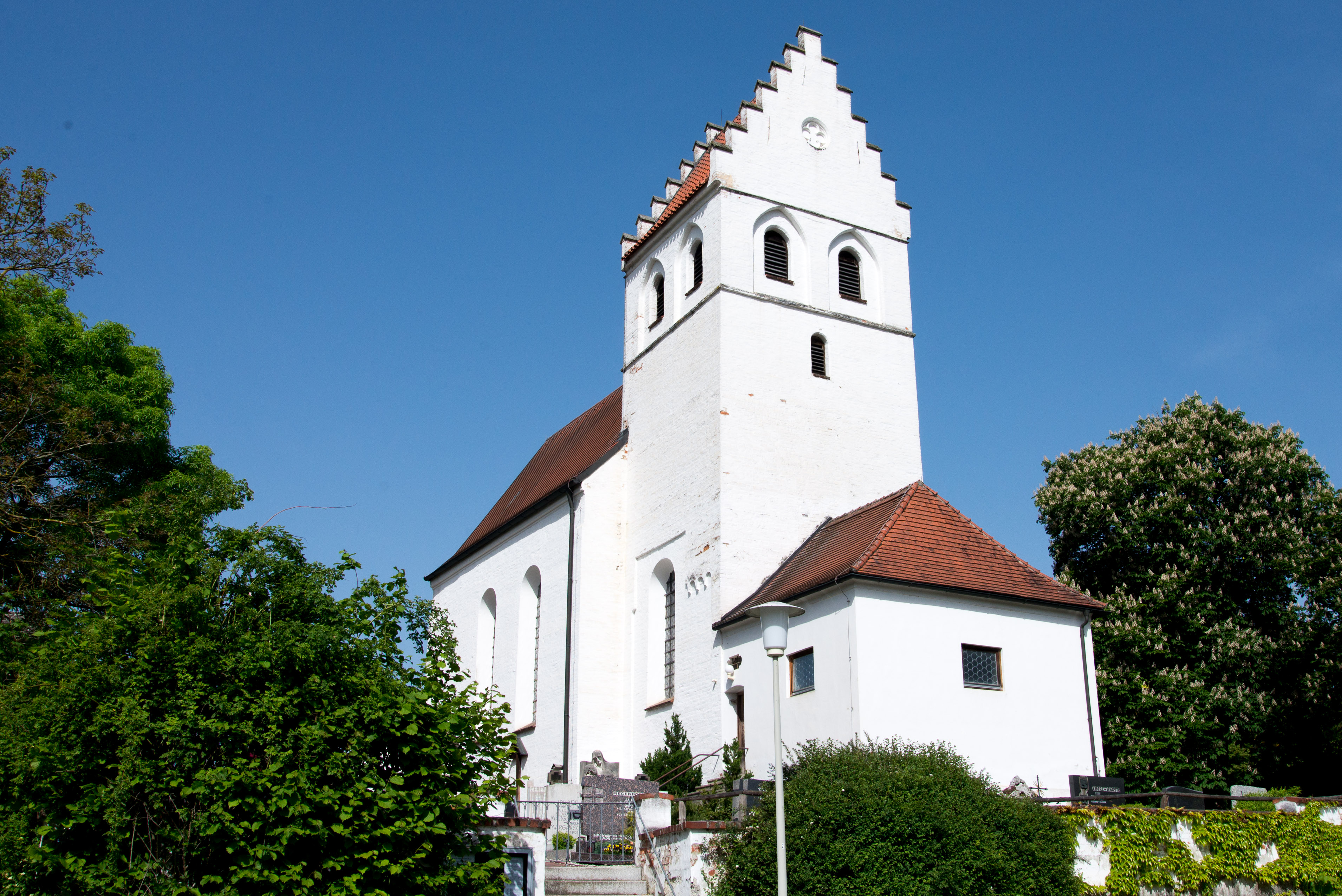 Katholische Pfarrkirche St. Petrus mit Mauer: Chorturmkirche, Backsteinbau, spätromanische Anlage, wohl noch Ende des 12. Jahrhunderts errichtet, barock und modern verändert, rundbogiges Südportal zweifach gestuft, Chorturm mit Satteldach und Treppengiebel, Maßwerkokulus und Spitzbogenblenden am Turm 19. Jahrhundert; mit Ausstattung; Friedhofs- und Befestigungsmauer, Backstein, 18/19 Jahrhundert mit älterem Bestand, teilweise modern erneuert. This is a photograph of an architectural monument.